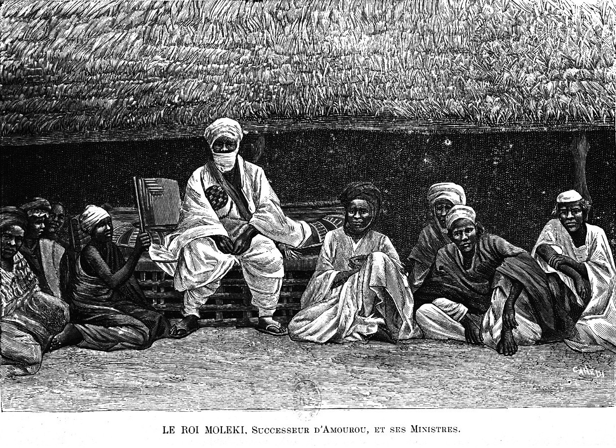 Gravure - Le roi Moleki, successeur d'Amourou au Bas-Niger (provenant de photographies prises sur les lieux par l'auteur)